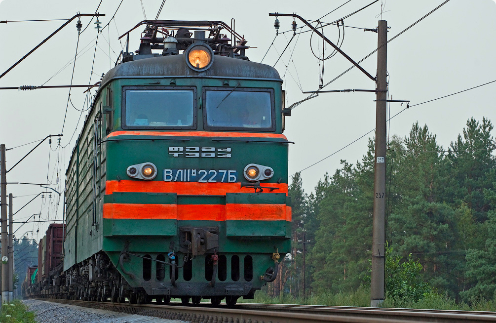 Электровоз ВЛ11М-227 с грузовым составом, перегон Киржач - Поточино